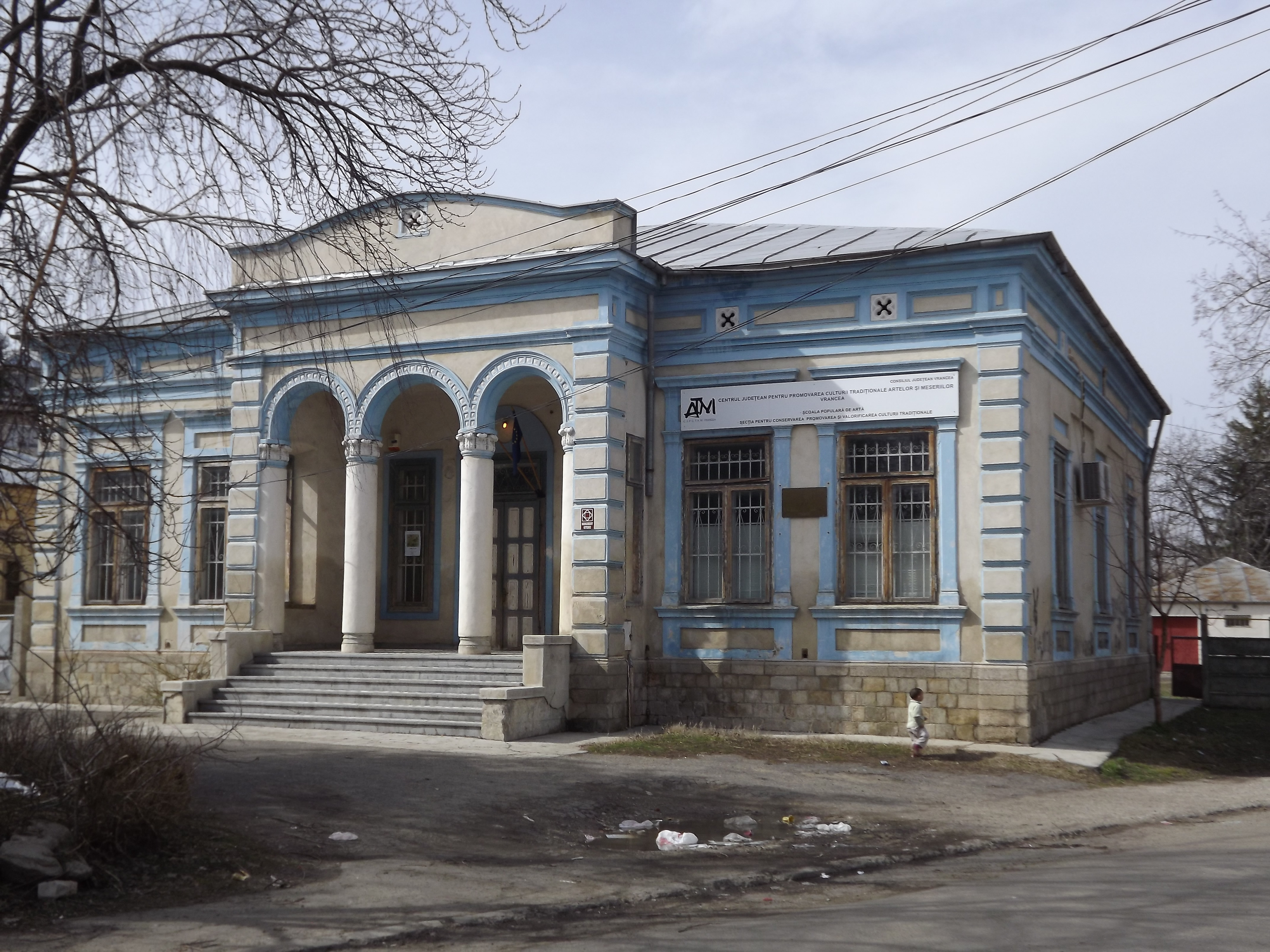 Casa Damian